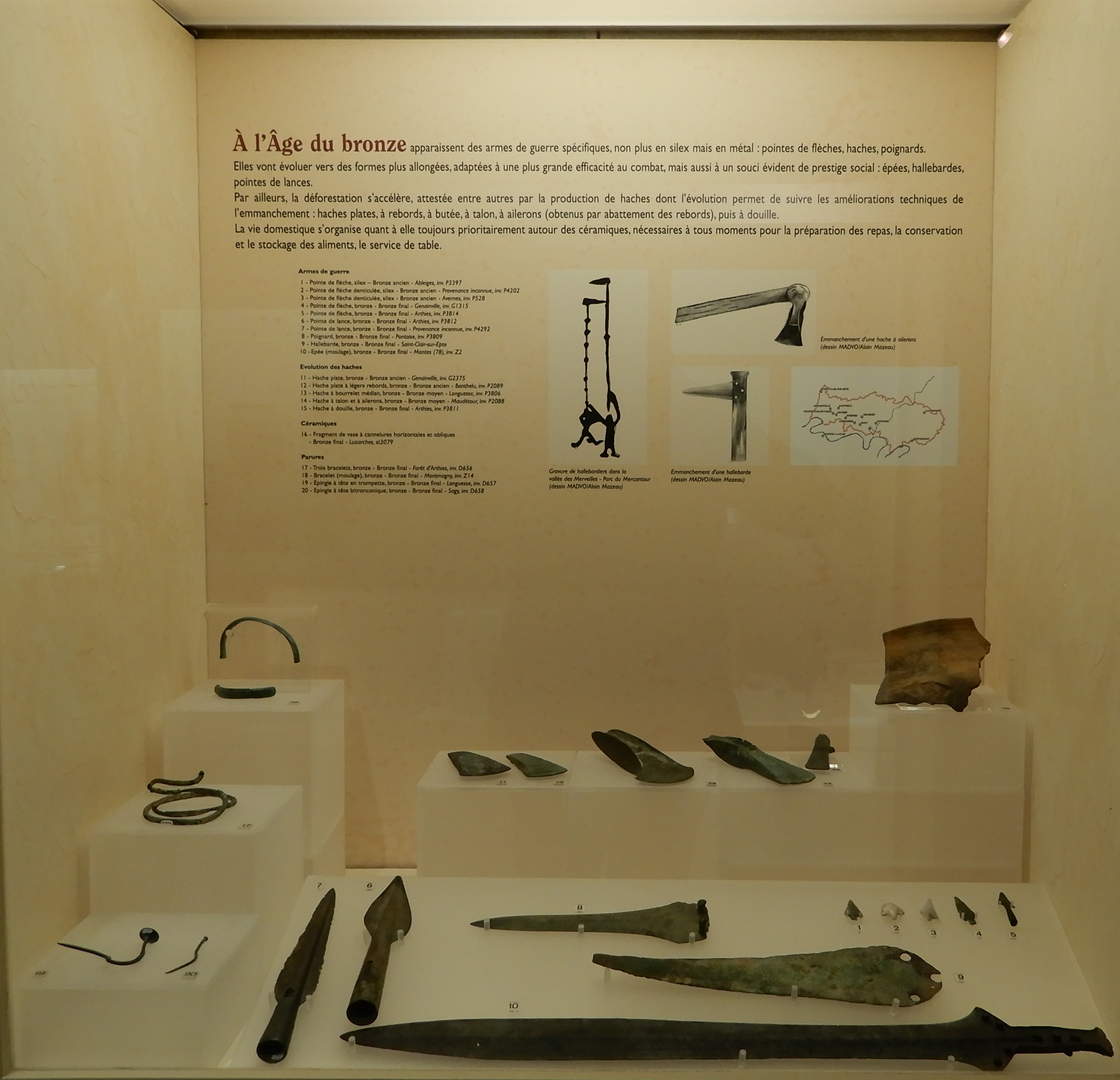 Armes de guerre, haches domestiques, céramiques et parures de l'Age du Bronze. Vitrine du Musée archéologique départemental du Val-d'Oise.